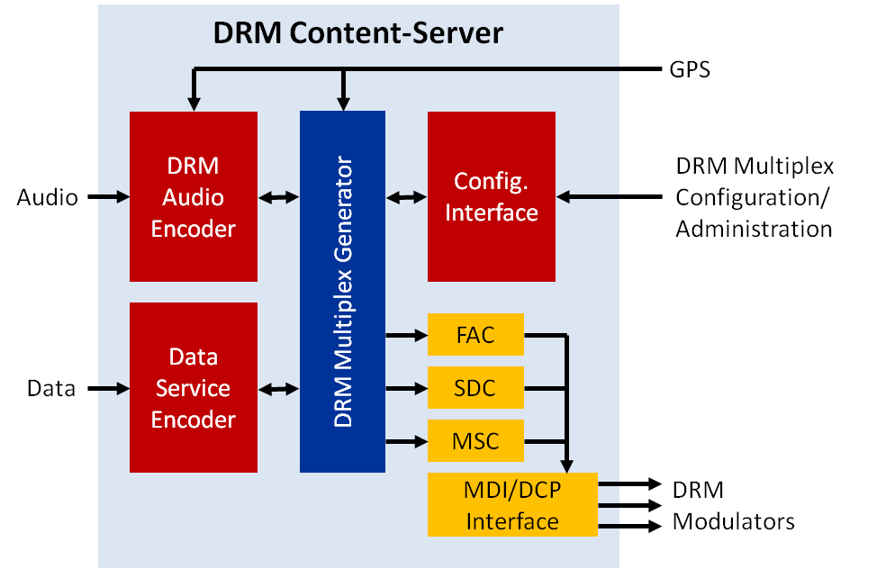 Digital Radio Mondiale: Schema des DRM-Contentservers